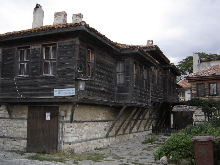 Wooden houses in Несебър, България